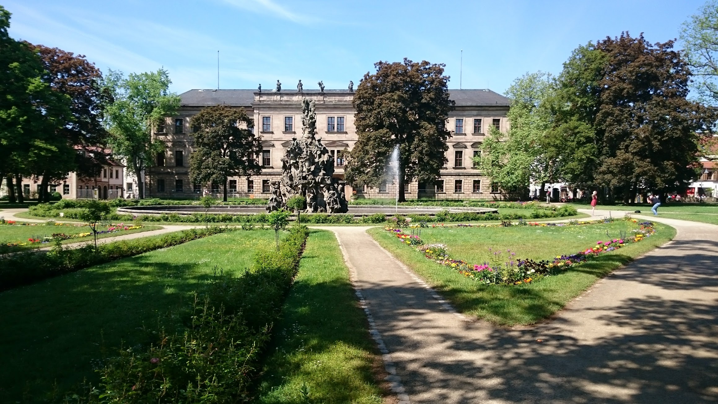 Hugenottenbrunnen mit Wasserspiel